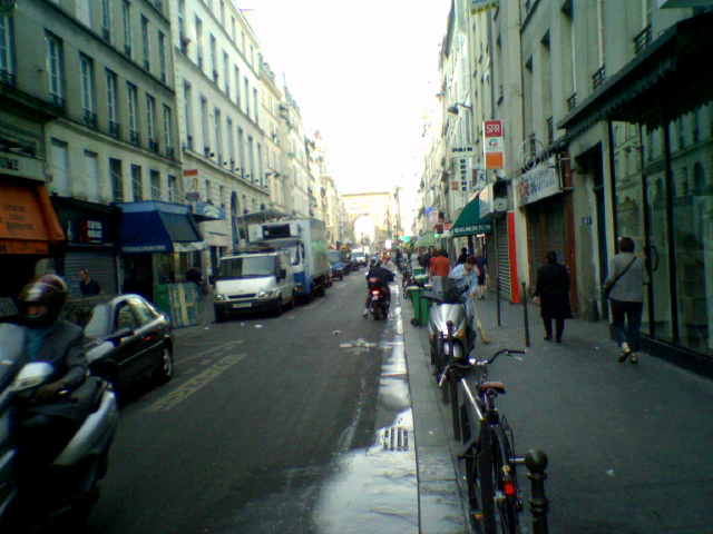 bas de la rue du Faubourg-Saint-Denis, (au fond, la Porte Saint-Denis